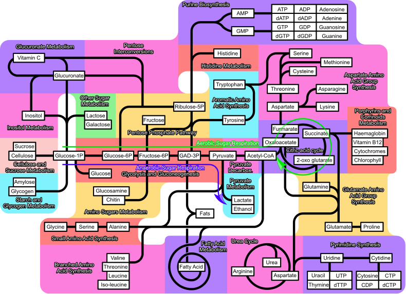 Metabolism 790px